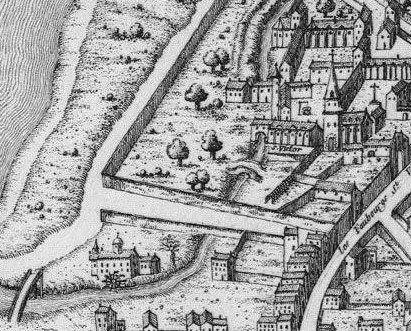 Terre d'Alez et moulin de la Bièvre, Abbaye Saint-Victor